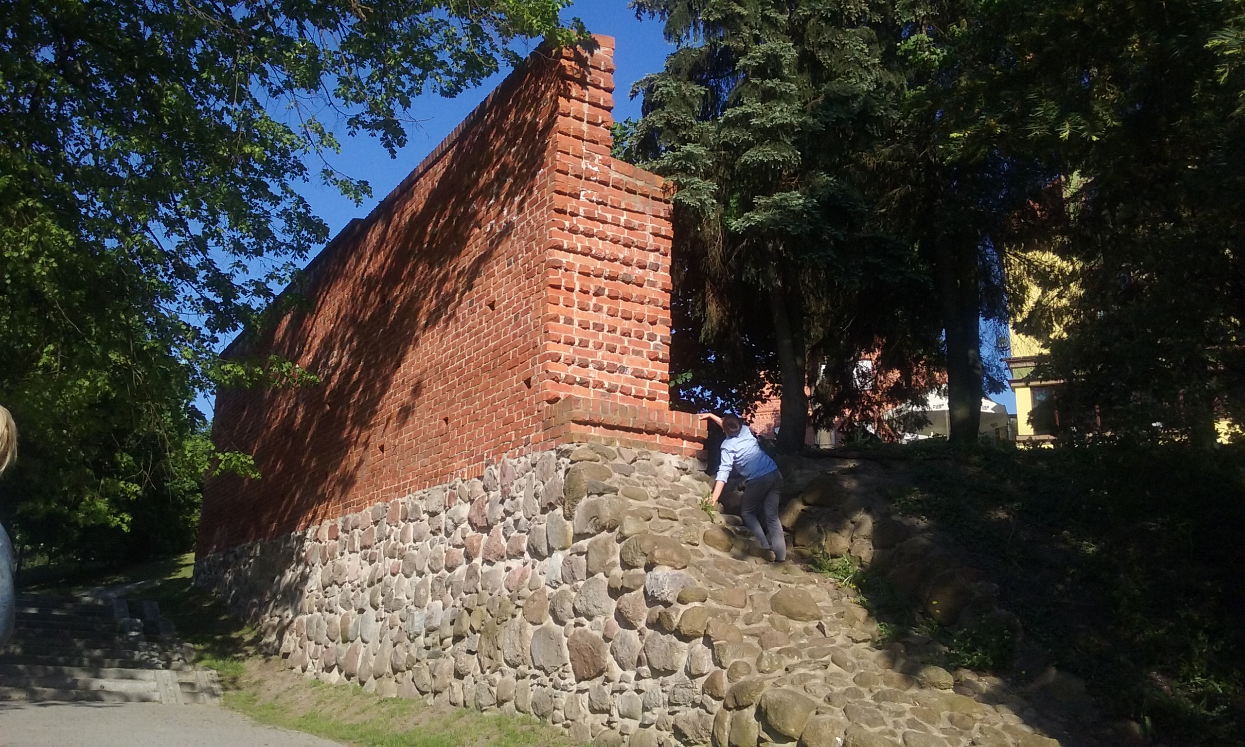 Fragment muru obronnego Olsztyna w parku zamkowym przy Targu Rybnym.